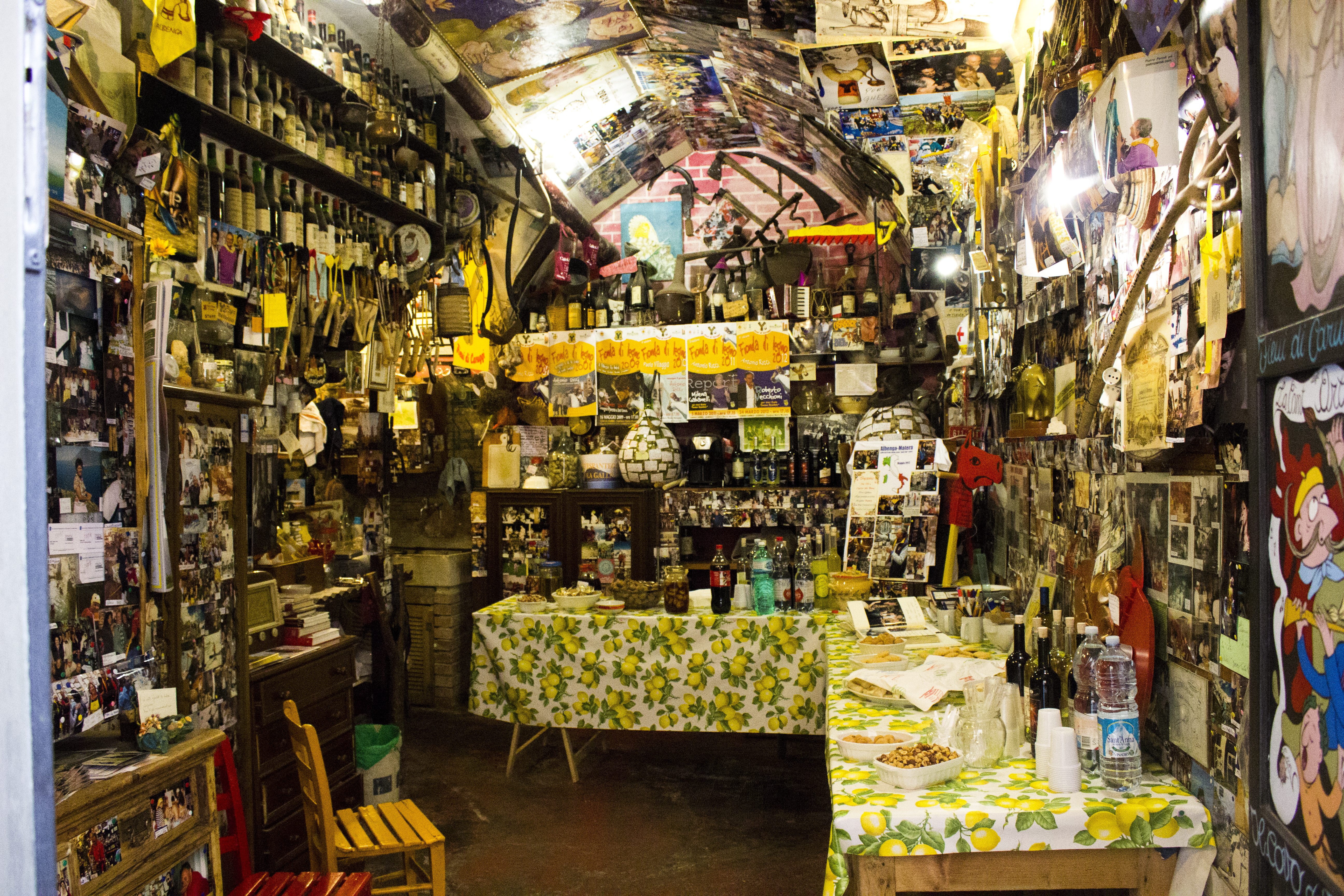 Scatto della Cantina dei fieui di Caruggi di Albenga